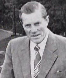 Företagare Ragnar Sellberg